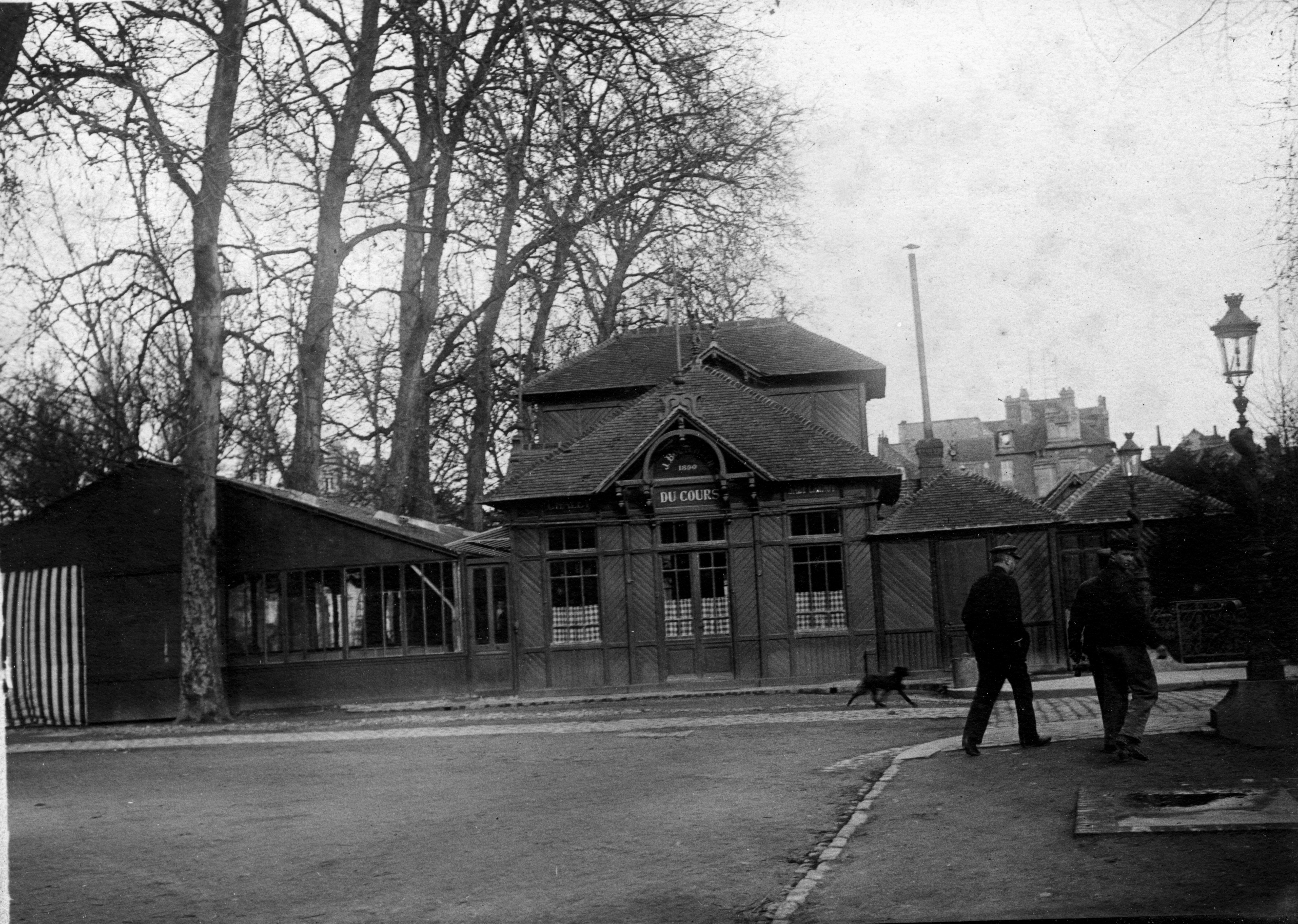 café-restaurant "le chalet" sur un cours longeant la Prairie à Caen (approximativement à l'emplacement de l'actuel monument au morts de la guerre 1914-1918 sur la place Maréchal Foch).